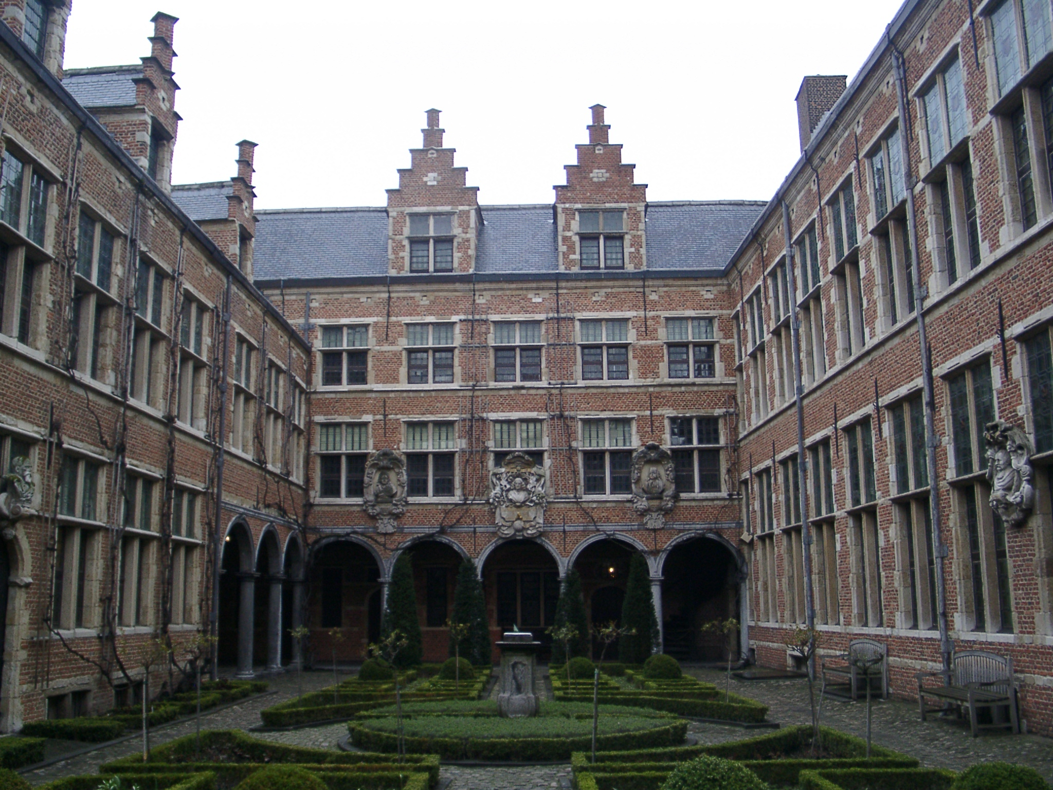 Museum Plantin-Moretus Antwerp